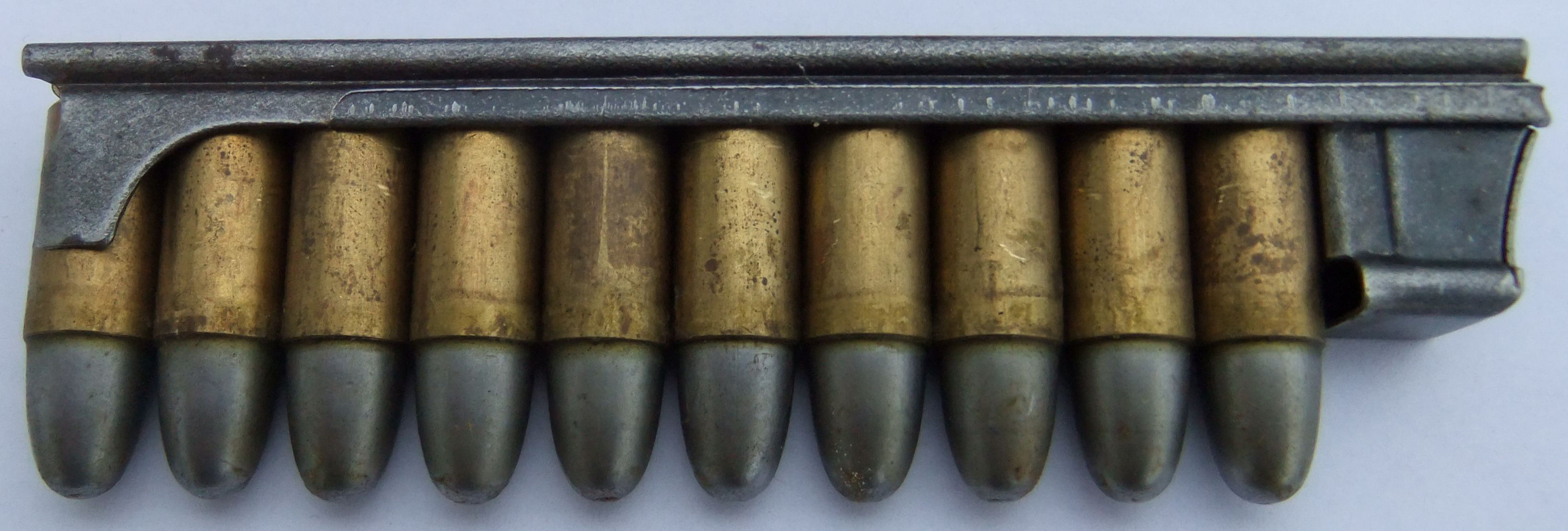 Okvirček za pištolo Roth-Steyr M.7